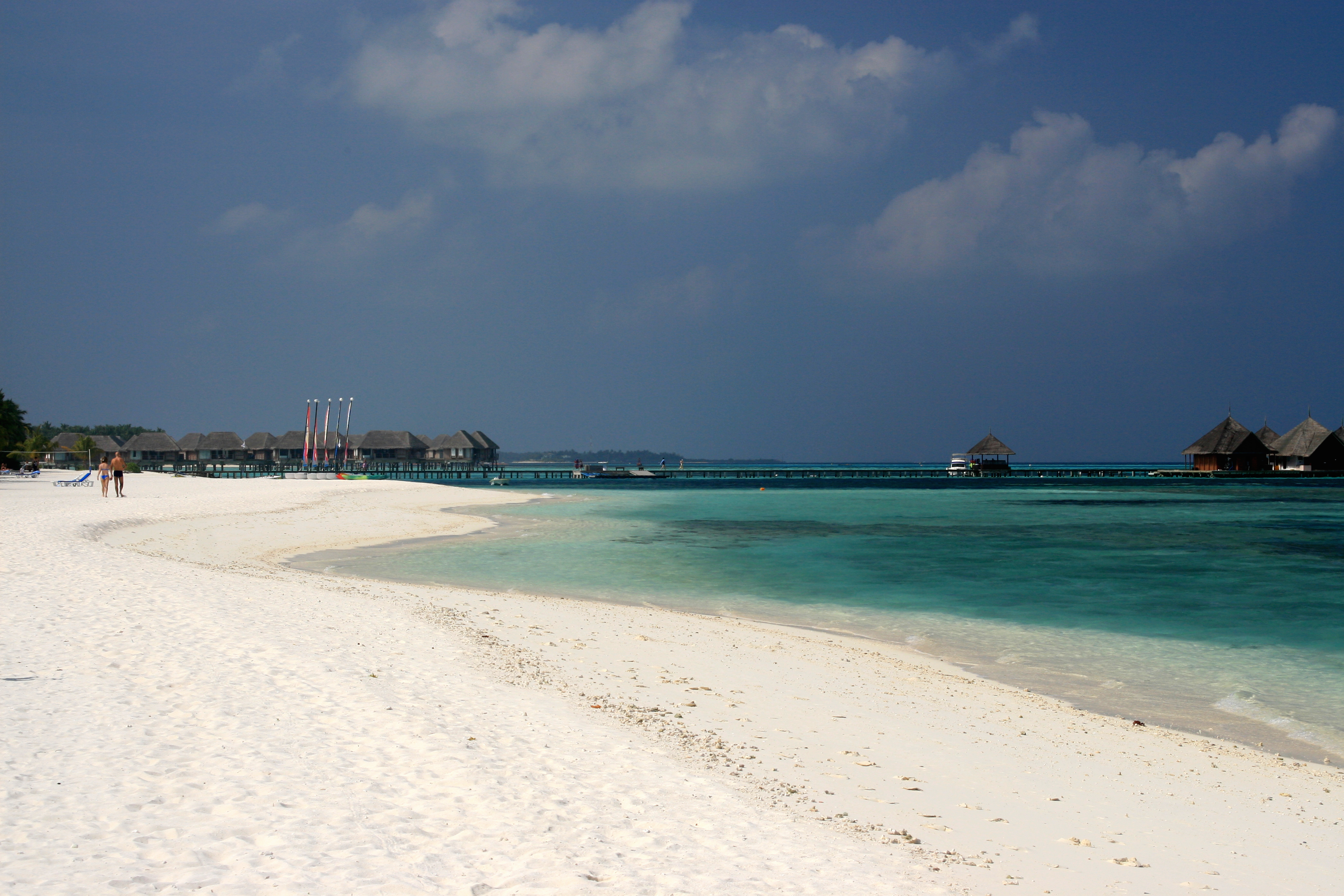 Ile de Kani - Atoll de Malé Nord